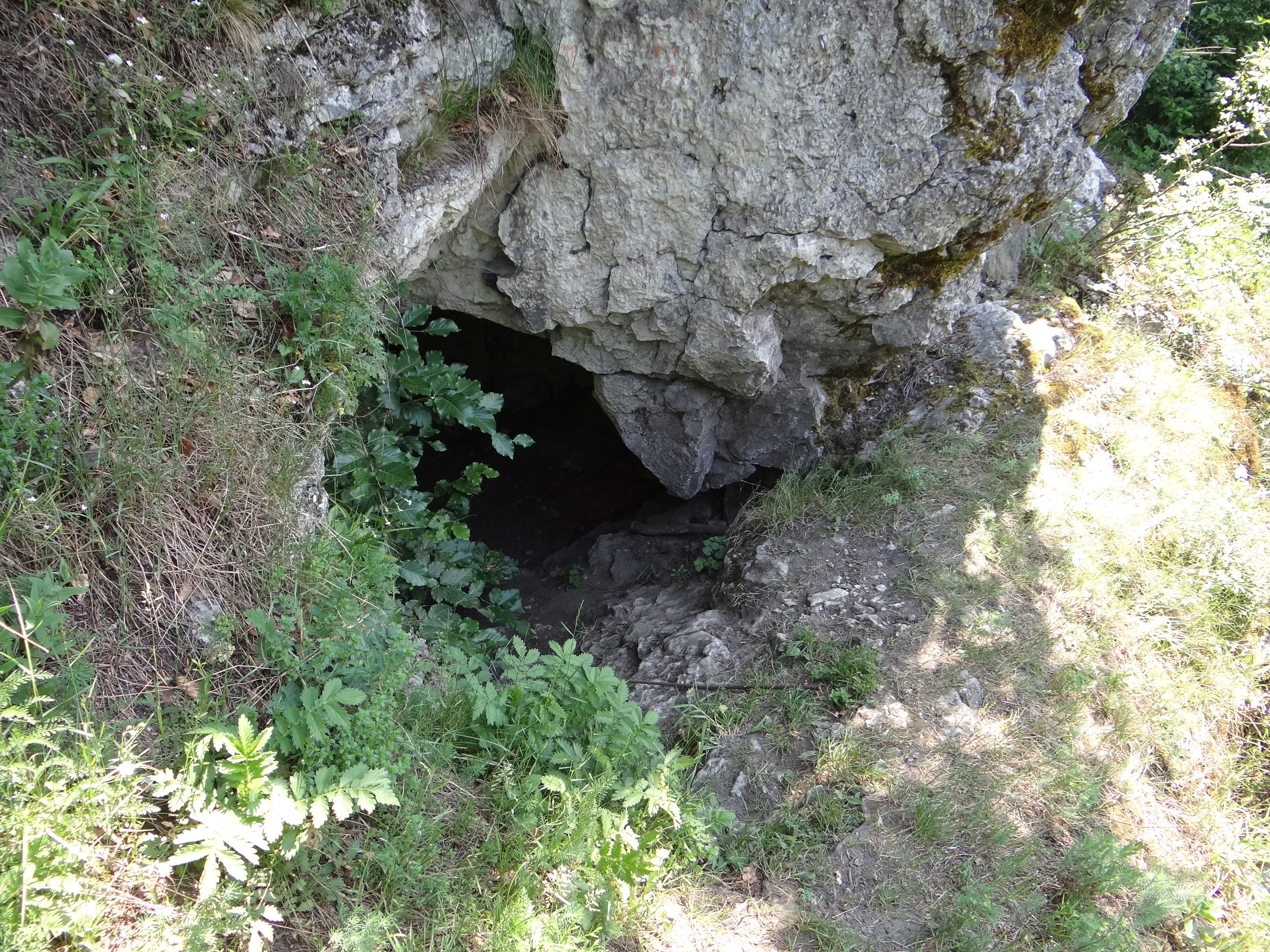 Jaskinia w Straszykowej